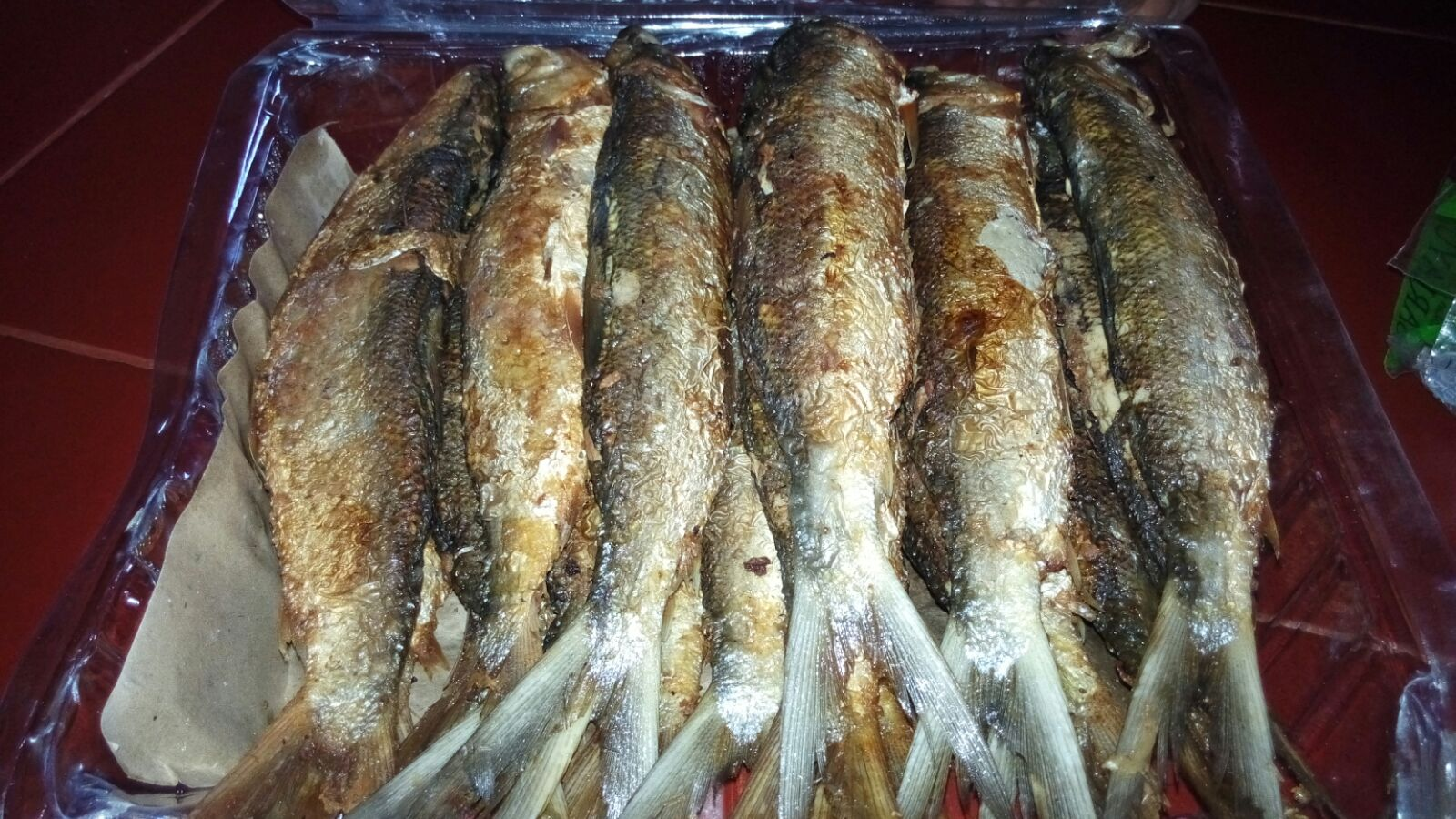 Bandeng Gepuk